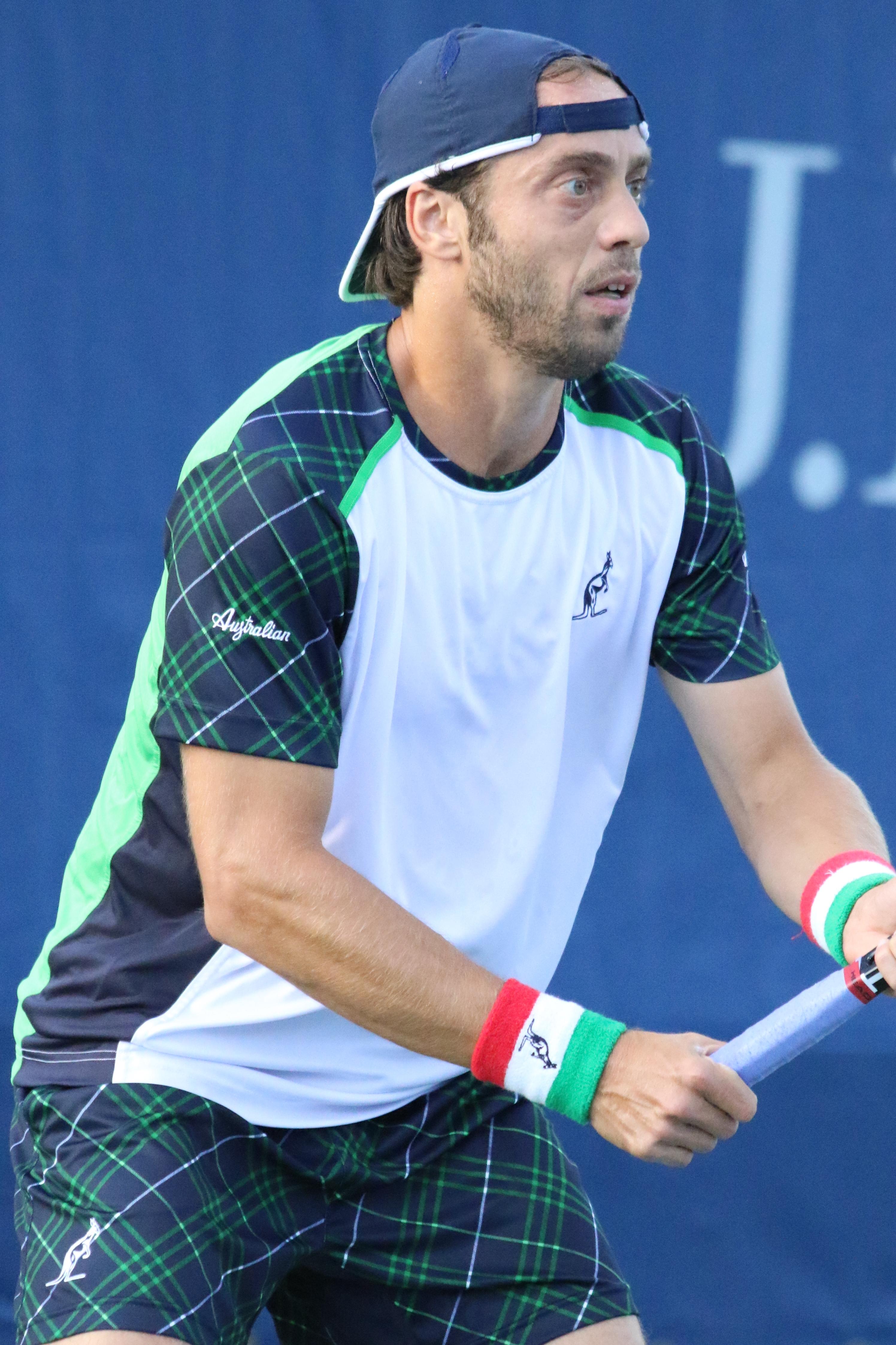 Lorenzi US16 (30)